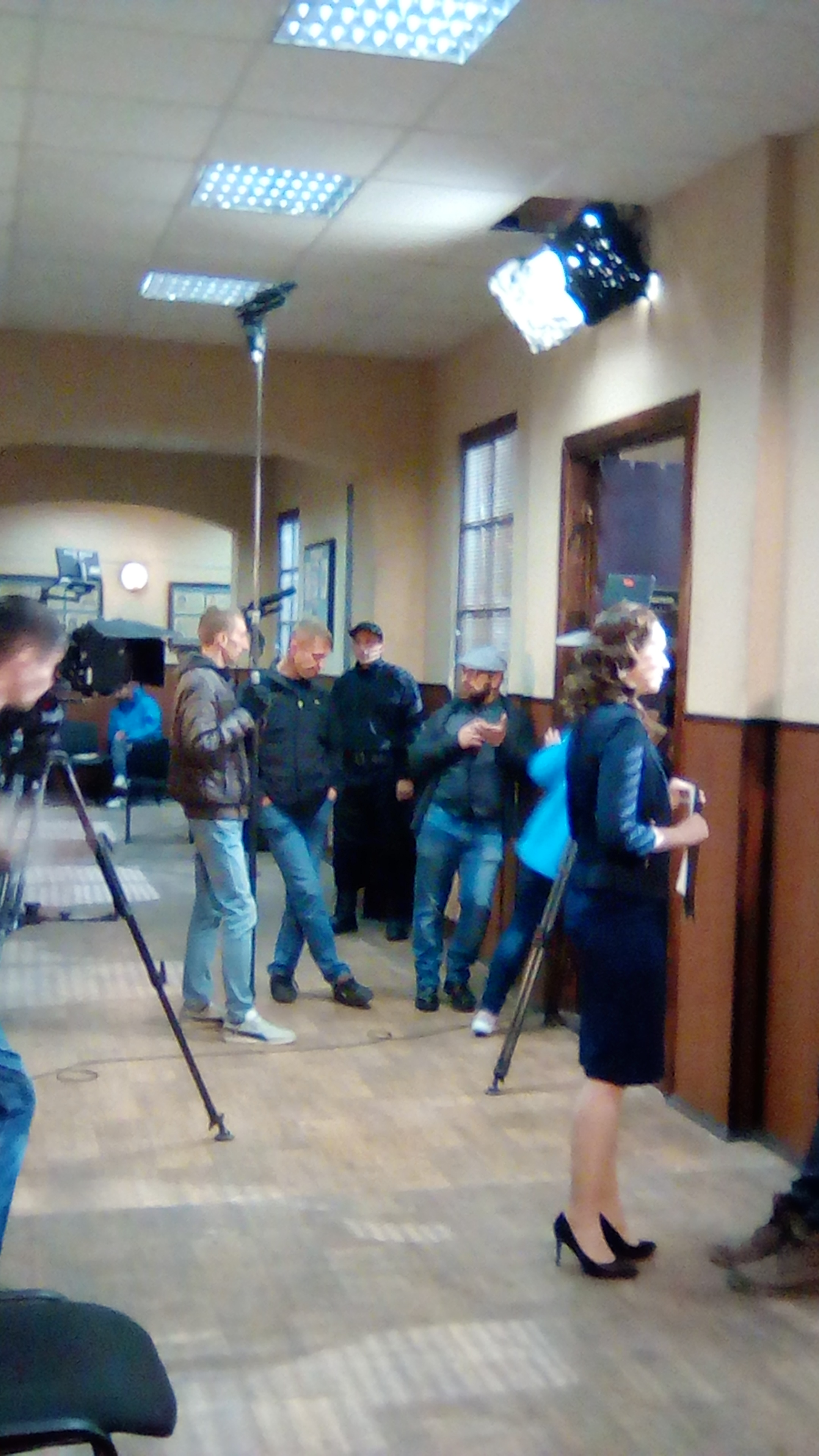 Съёмки